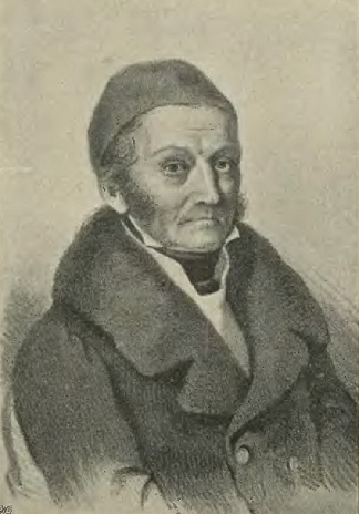 Józef Pitschmann